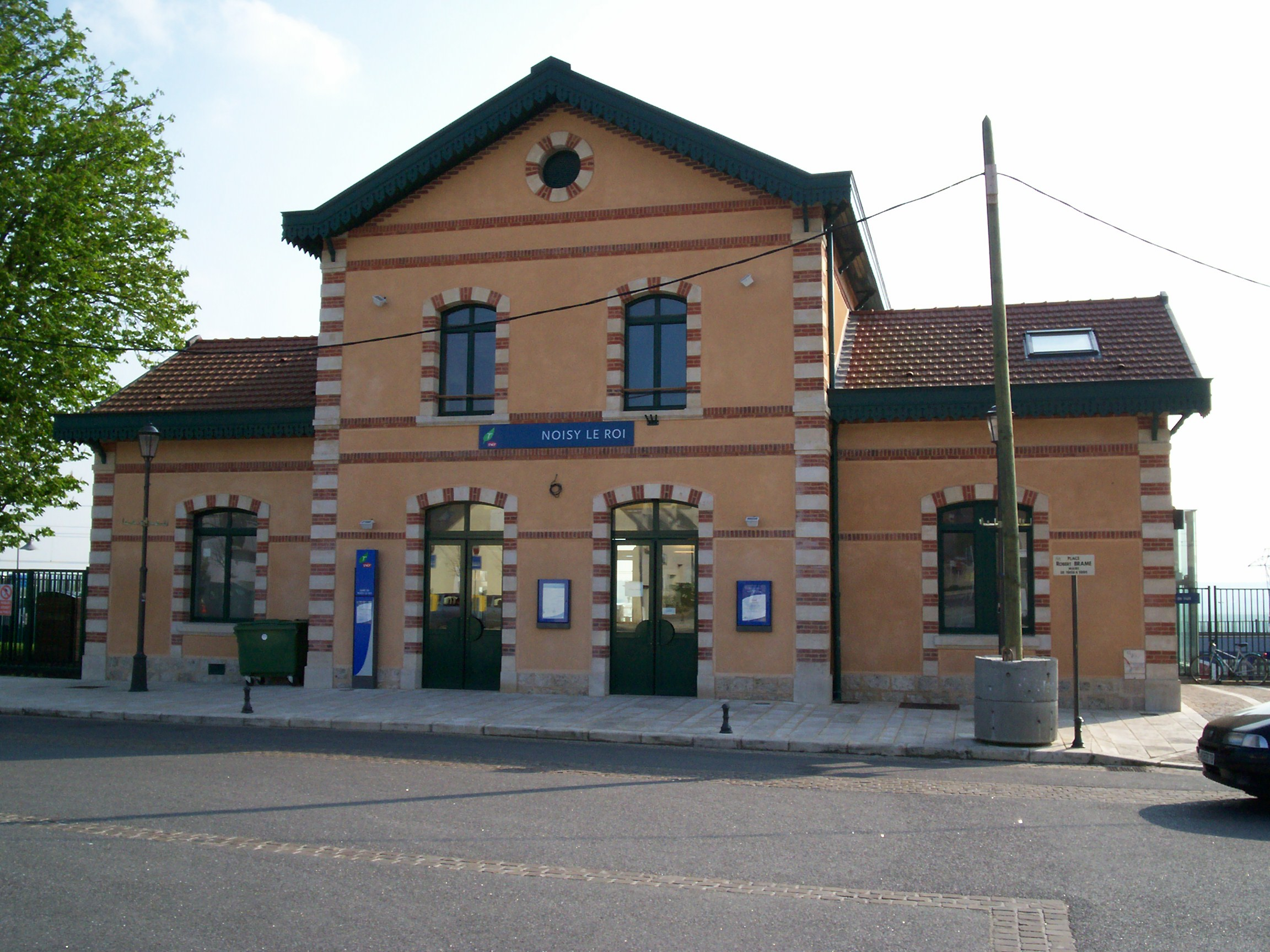 Bâtiment voyageurs de Noisy-le-Roi vue générale